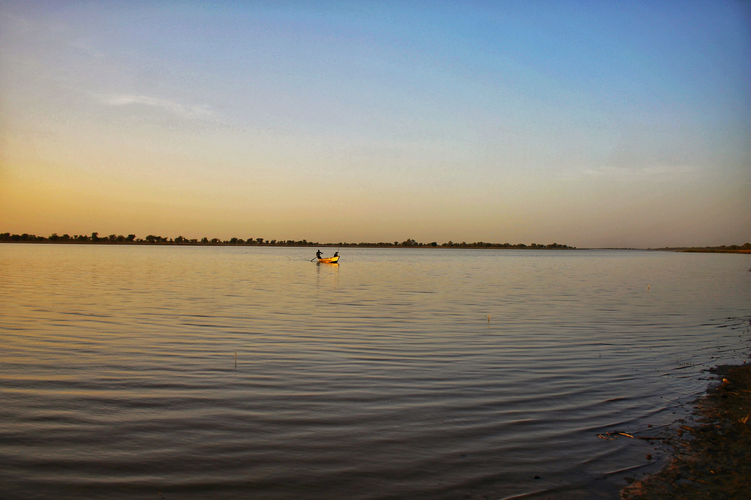 Lac de Guere. Arrondissement de Guere, département de mayo danay.